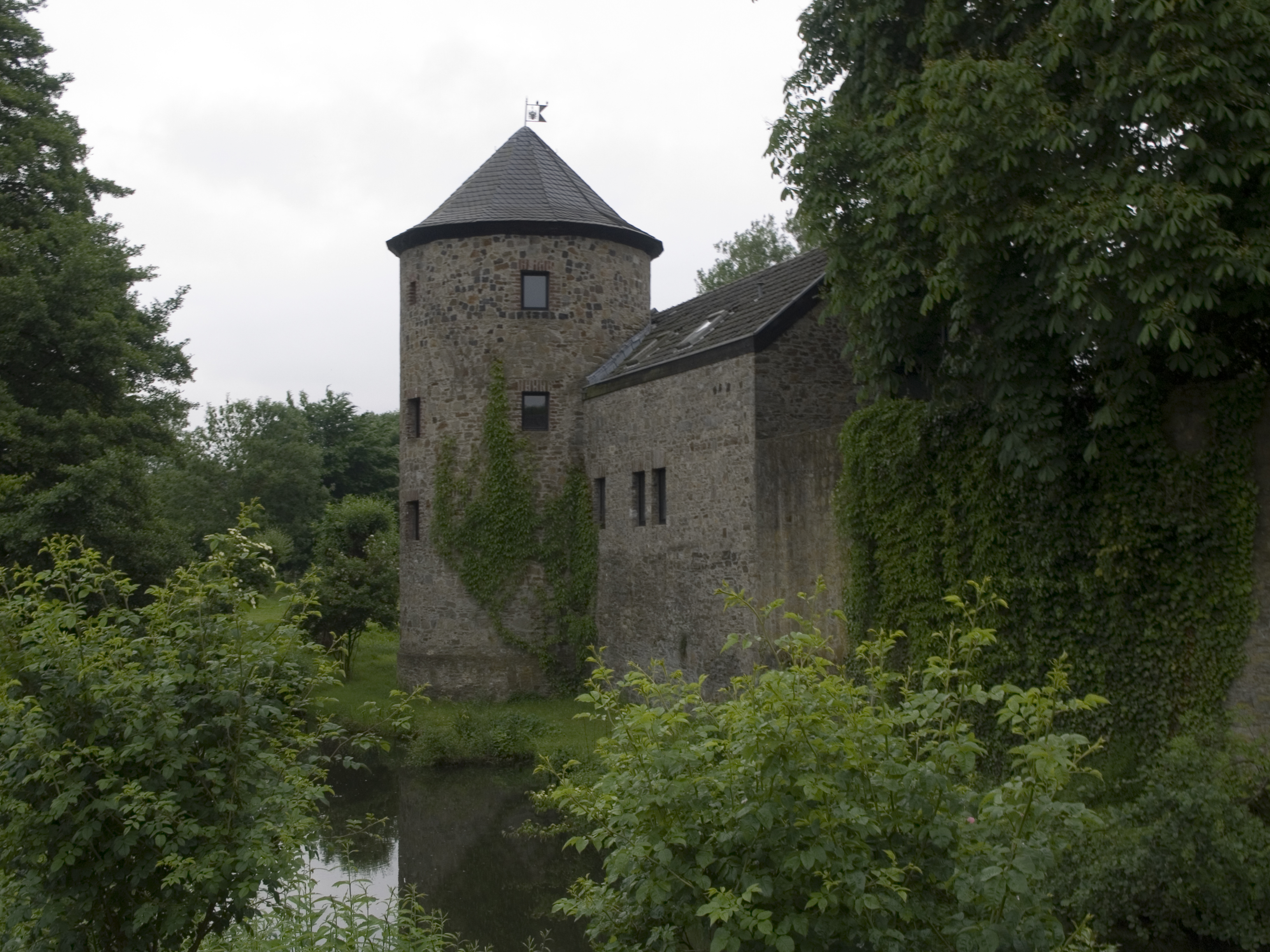 Северный Рейн-Вестфалия, Ратинген - Замок Хауз